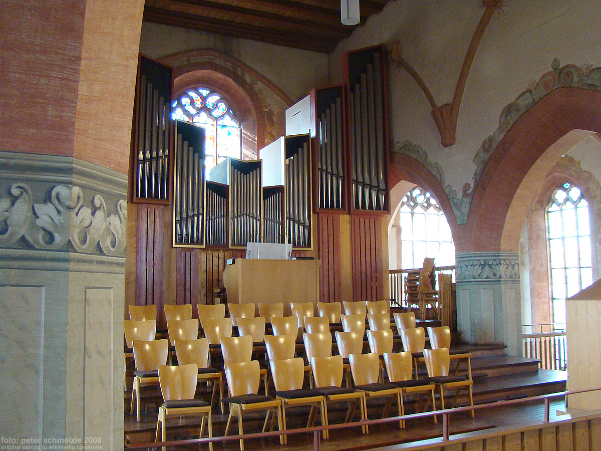 Orgelempore in der Regiswindiskirche in Lauffen am Neckar